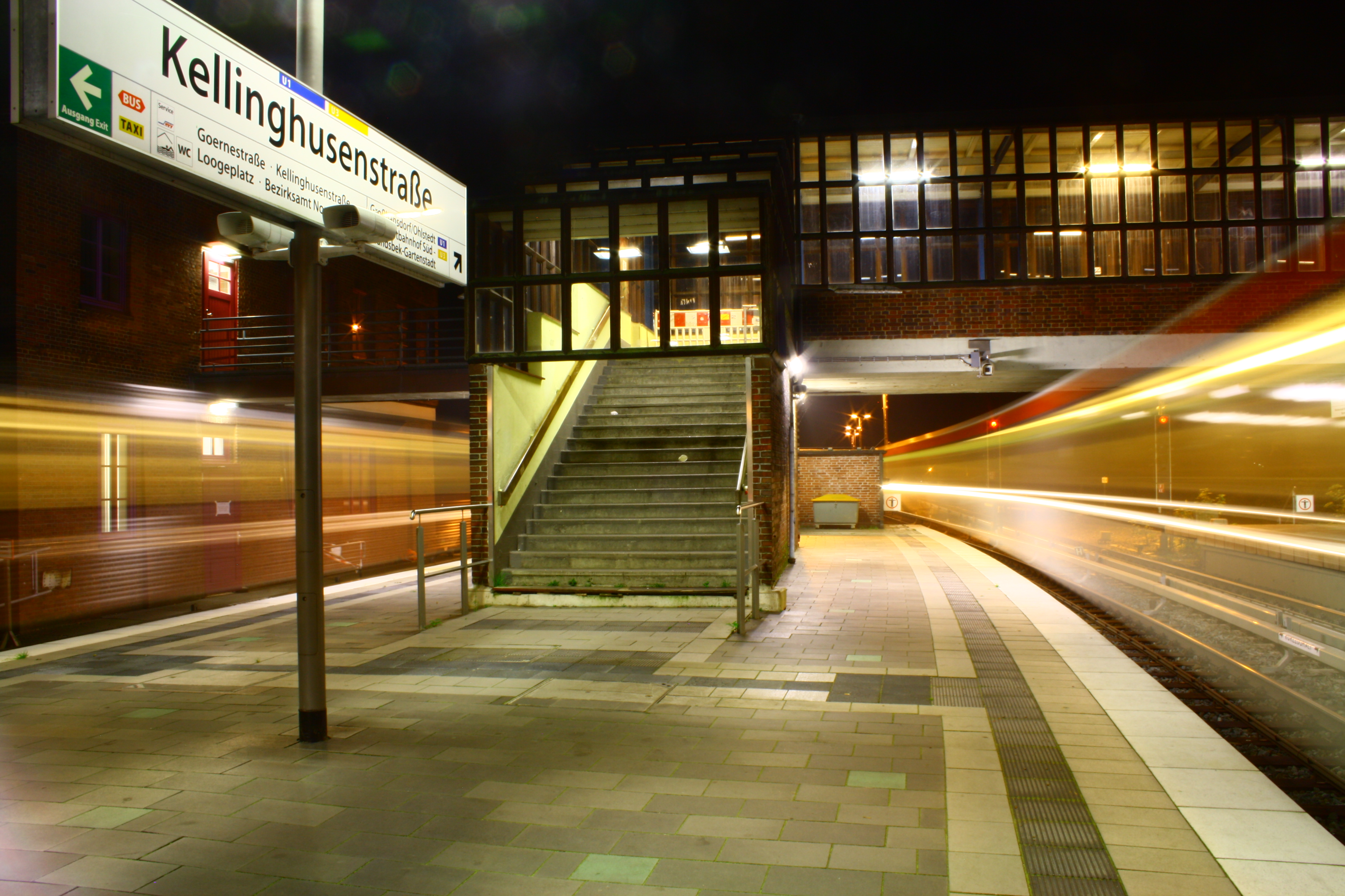 U Kellinghusenstraße, U1 und U3 Richtung Norderstedt/Barmbek fahren ein